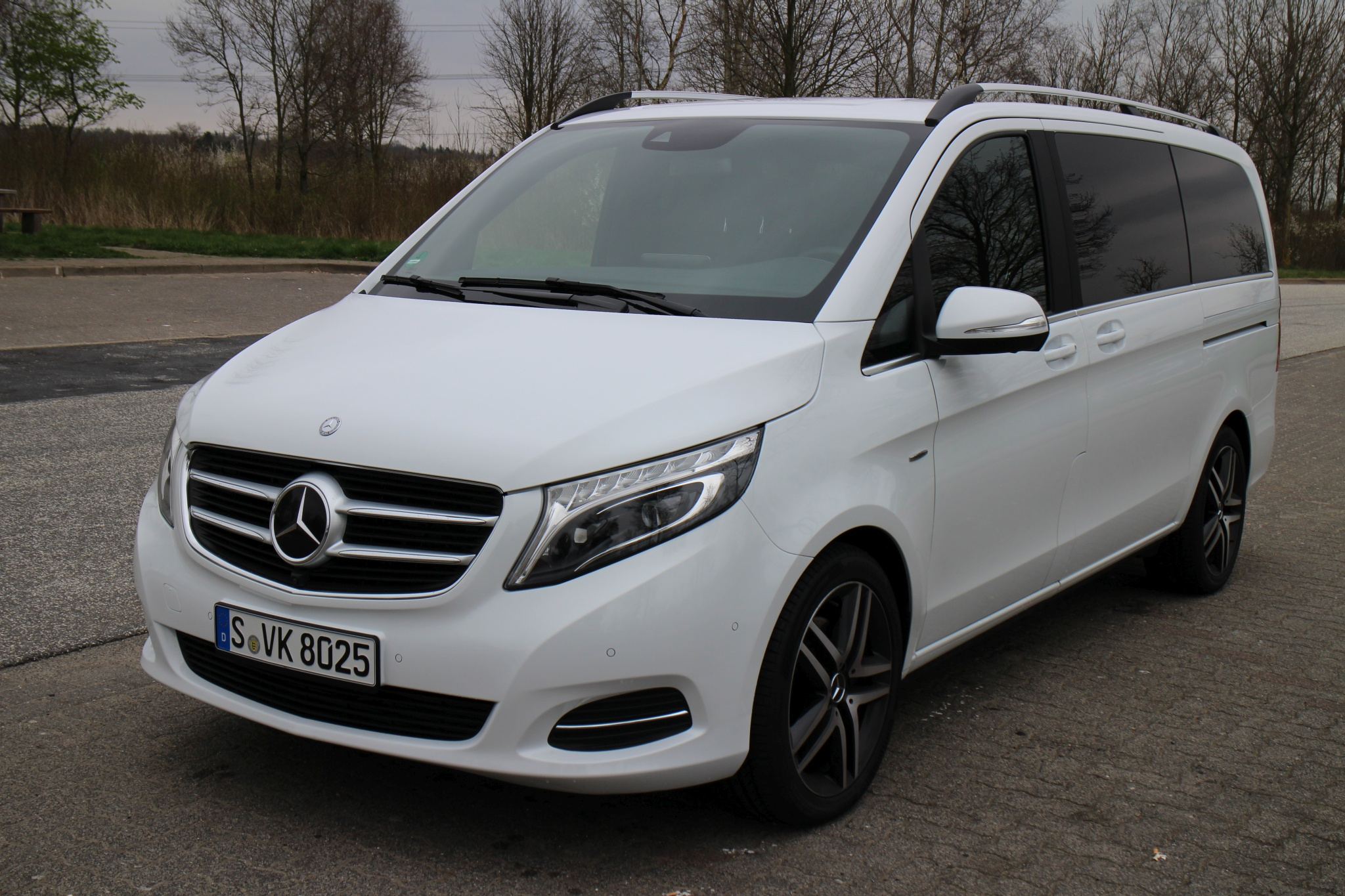 V-Klasse April 2014 Ausstattungslinie: Avantgarde Motor: V 250 Bluetec, 140 KW (190 PS), Diesel